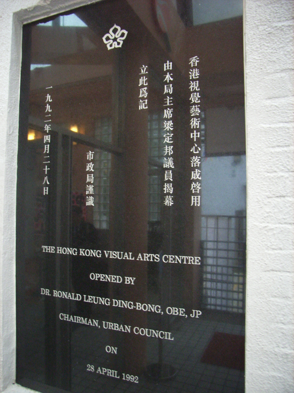 Hong Kong Visual Arts Centre 香港視覺藝術中心 香港中區堅尼地道7A